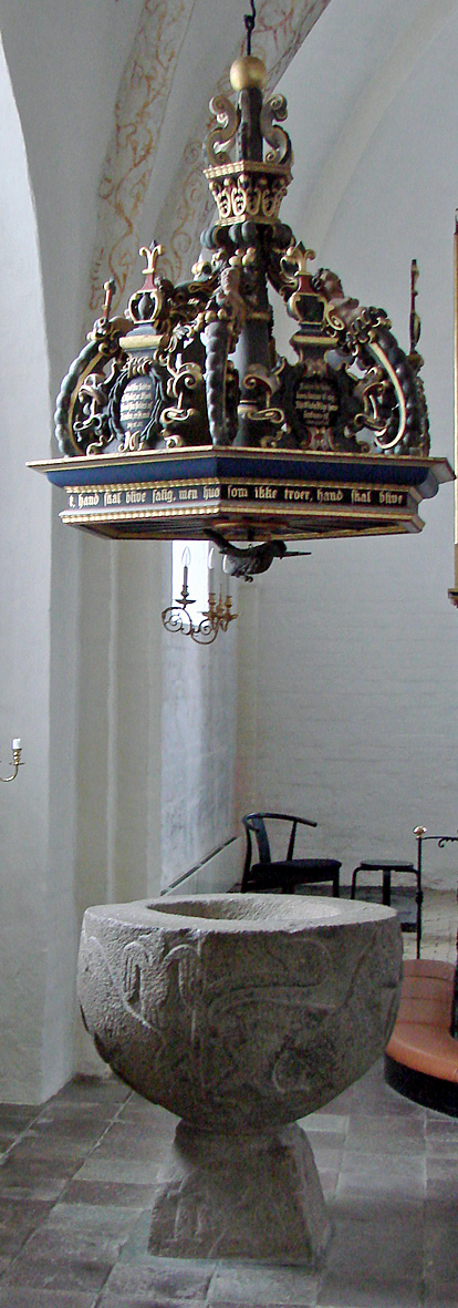 Døbefont med himmel. Østbirk Kirke ligger i Voer Herred i det tidligere Skanderborg Amt i Østjylland. Kirken hørte i middelalderen under Voer Kloster men præges nu af tilhørsforholdet til slægten Skram på Urup.